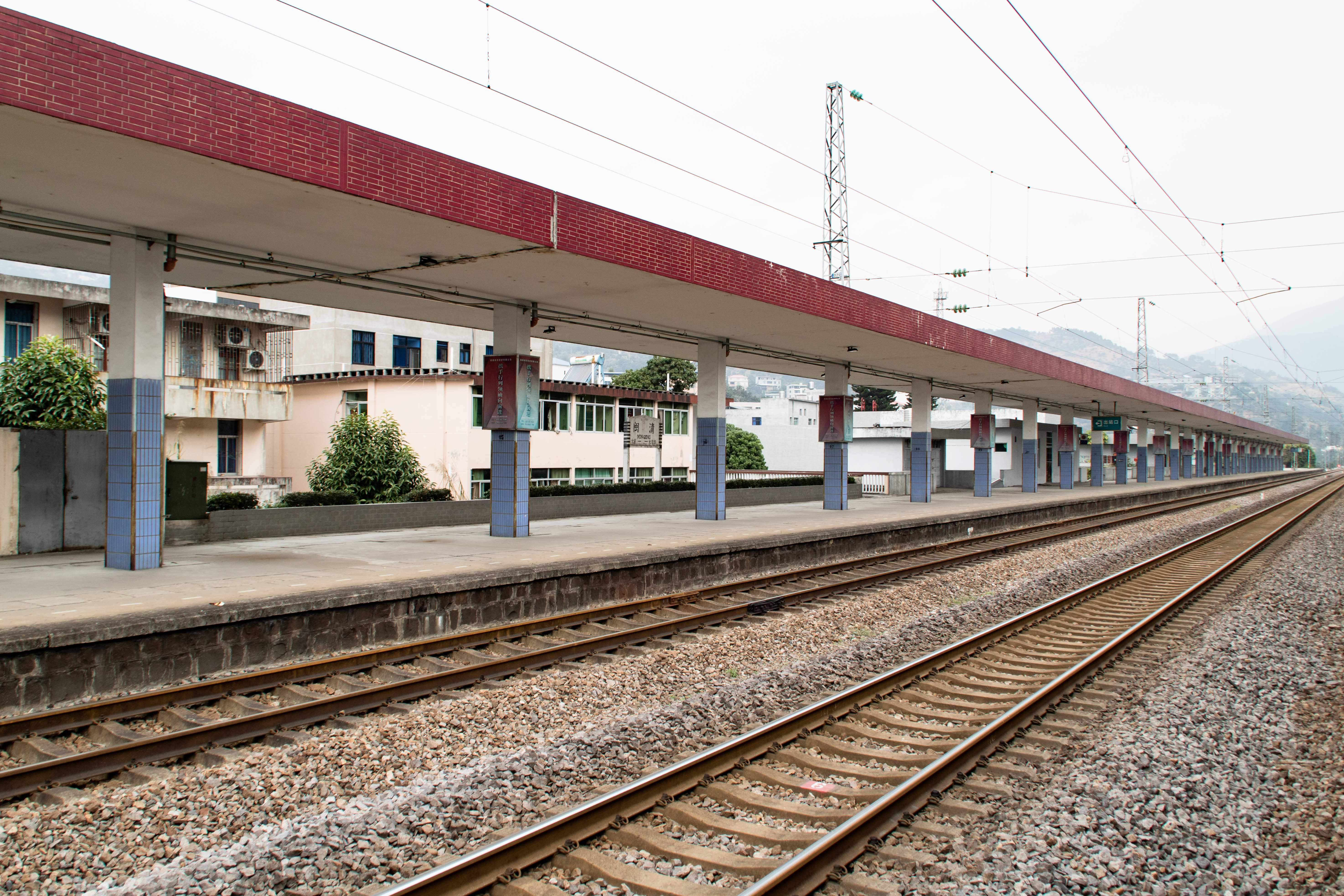 中文（中国大陆）: 闽清站站台与站场